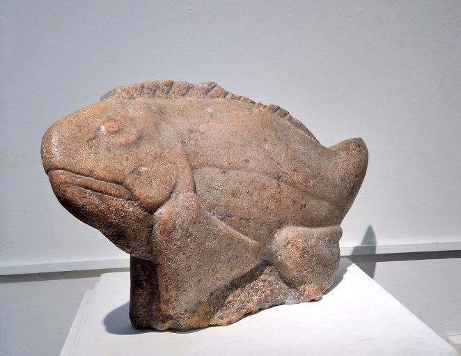 Дмитрий Цаплин, скульптура "Рыба", ГТГ, начало 1950-х